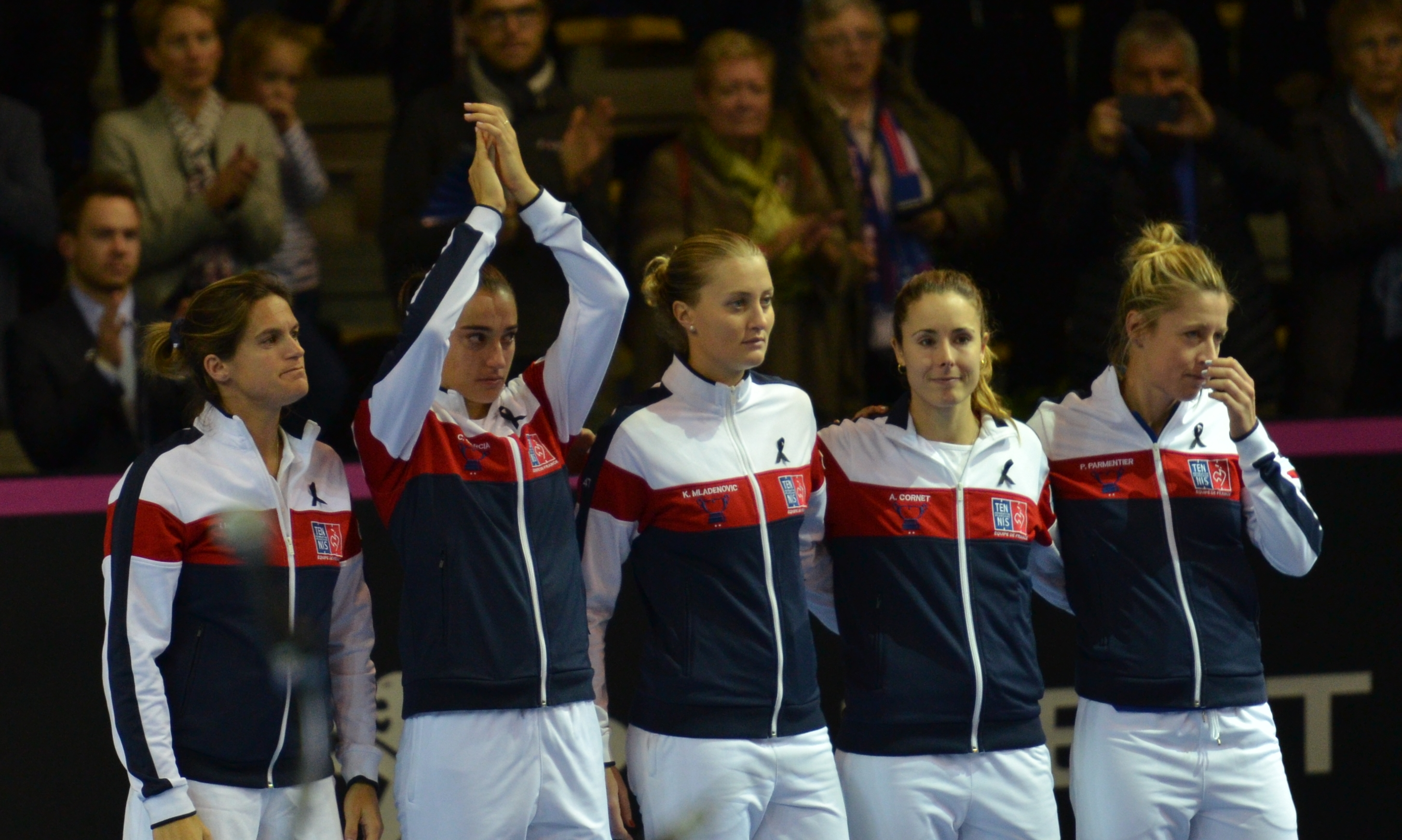 PPP_3457